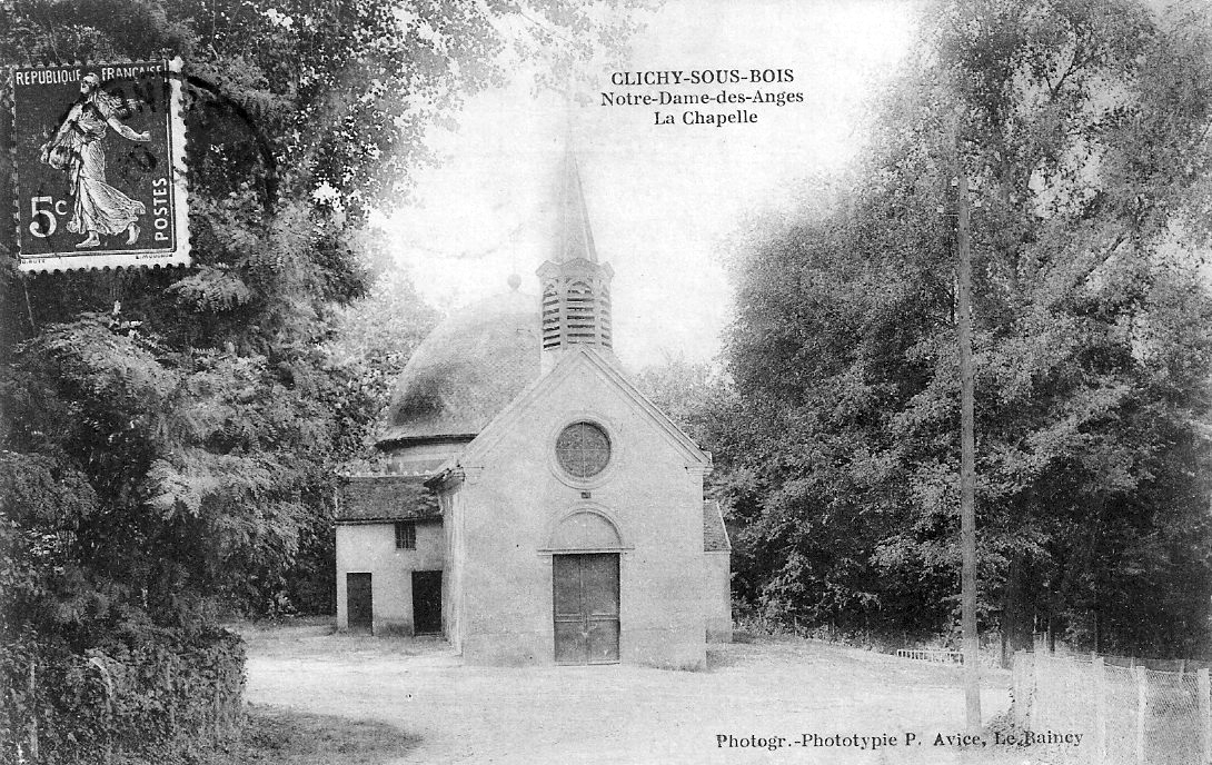 La Chapelle Notre-Dame-des-Anges à Clichy-sous-Bois au début du XXe siècle.